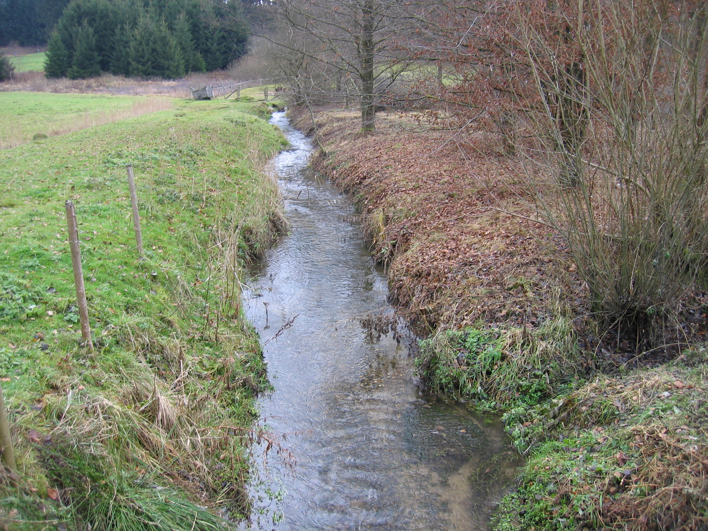 Ringgenbach